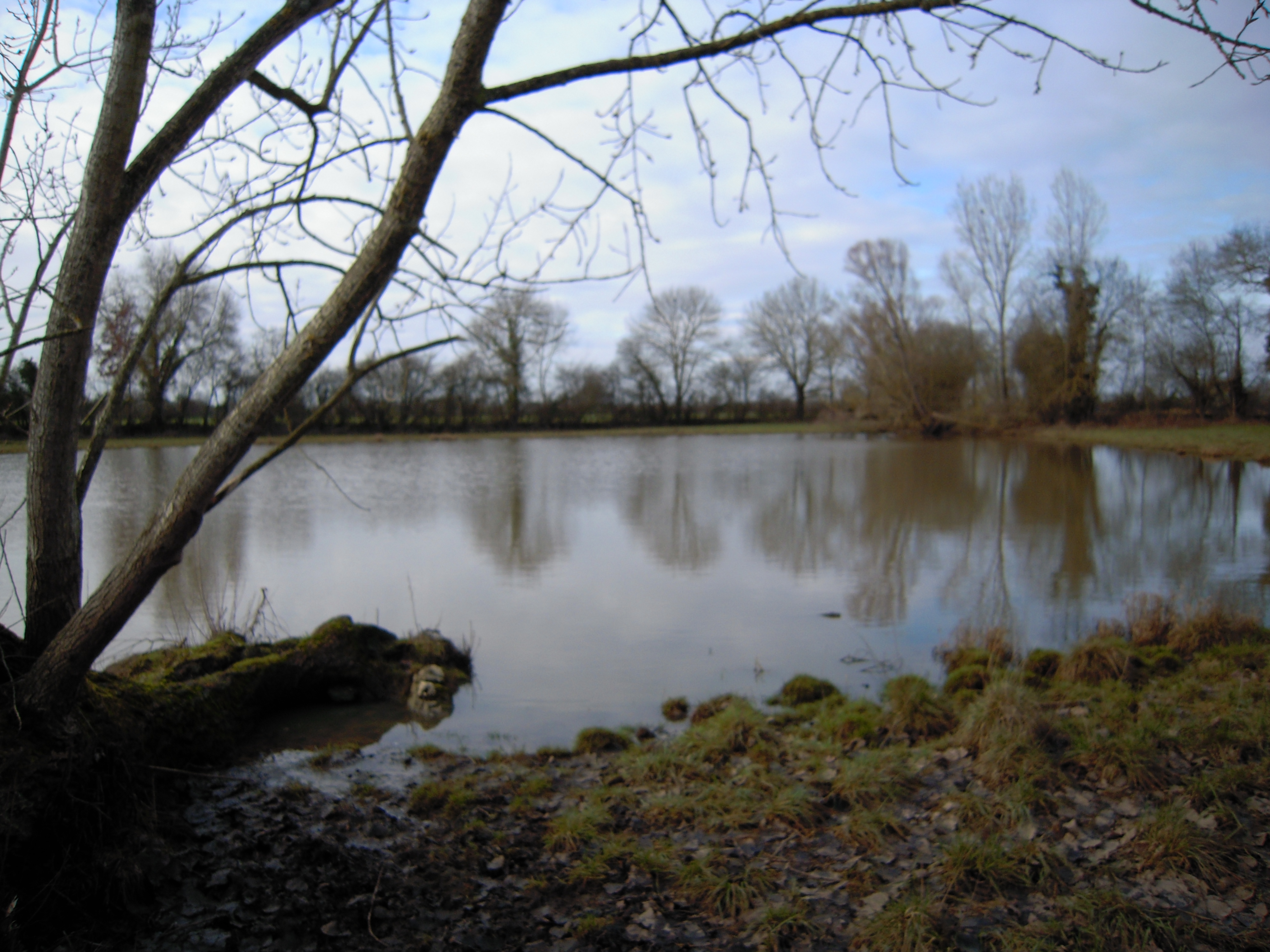 étang du Clairet à 49370 [La Pouëze], source de [l'Erdre], rivière qui se jette dans la Loire,à Nantes (France).